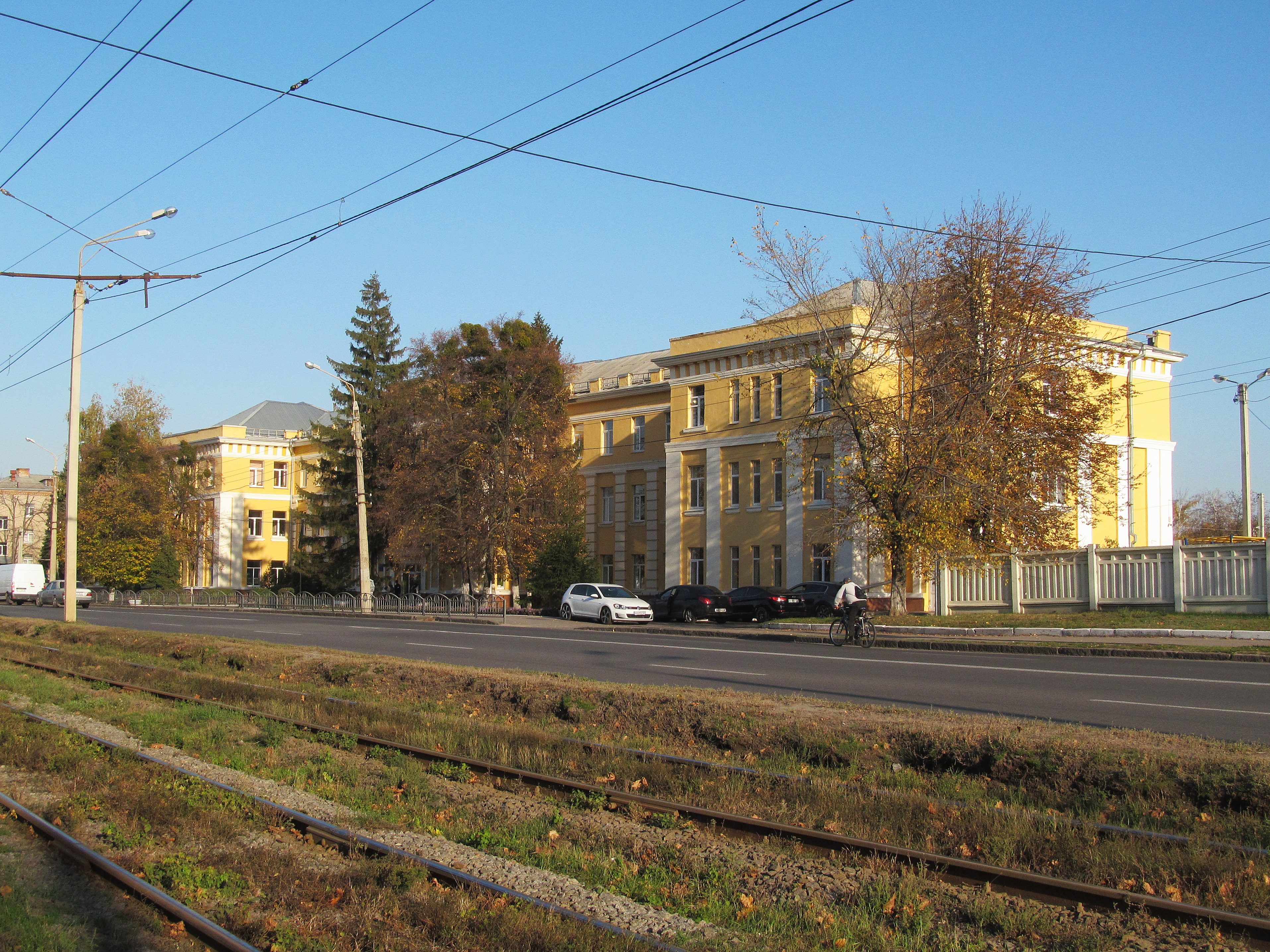 Харківська спеціалізована школа І-ІІІ ступенів № 134 Харківської міської ради. Вул. Шевченка, 220